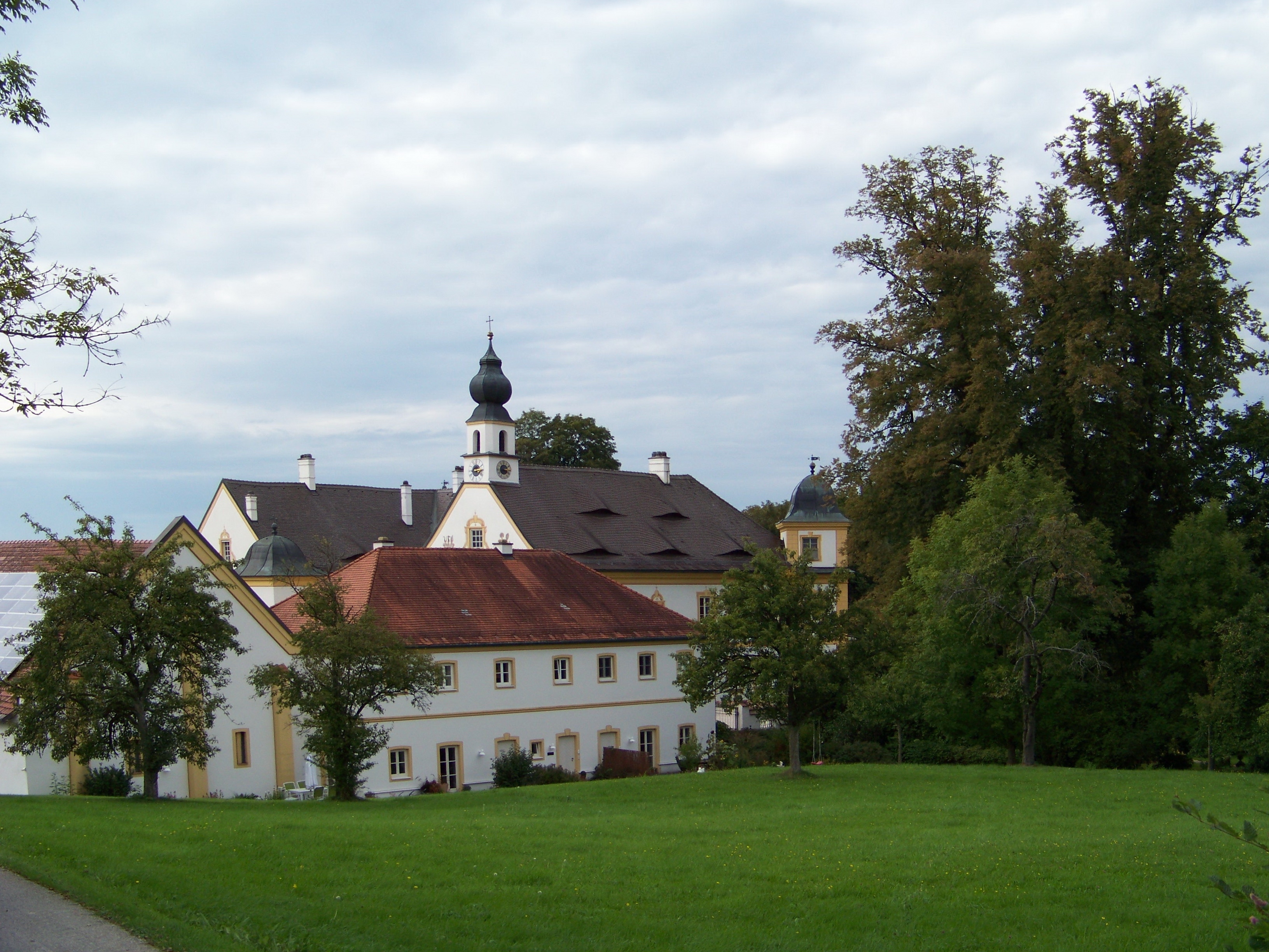 Postmünster, Thrunstein 1. Schloss Thurnstein, barocke Dreiflügelanlage, an der Südseite offen, dreigeschossig mit Walmdächern, um 1689 erbaut, z. T. über Resten der mittelalterlichen Burg Thurnstein, Nordfront mit Ecktürmen, südlicher Eckturm an der Westseite modern, Anfang 20. Jahrhundert; Schlosskapelle im Ostflügel.